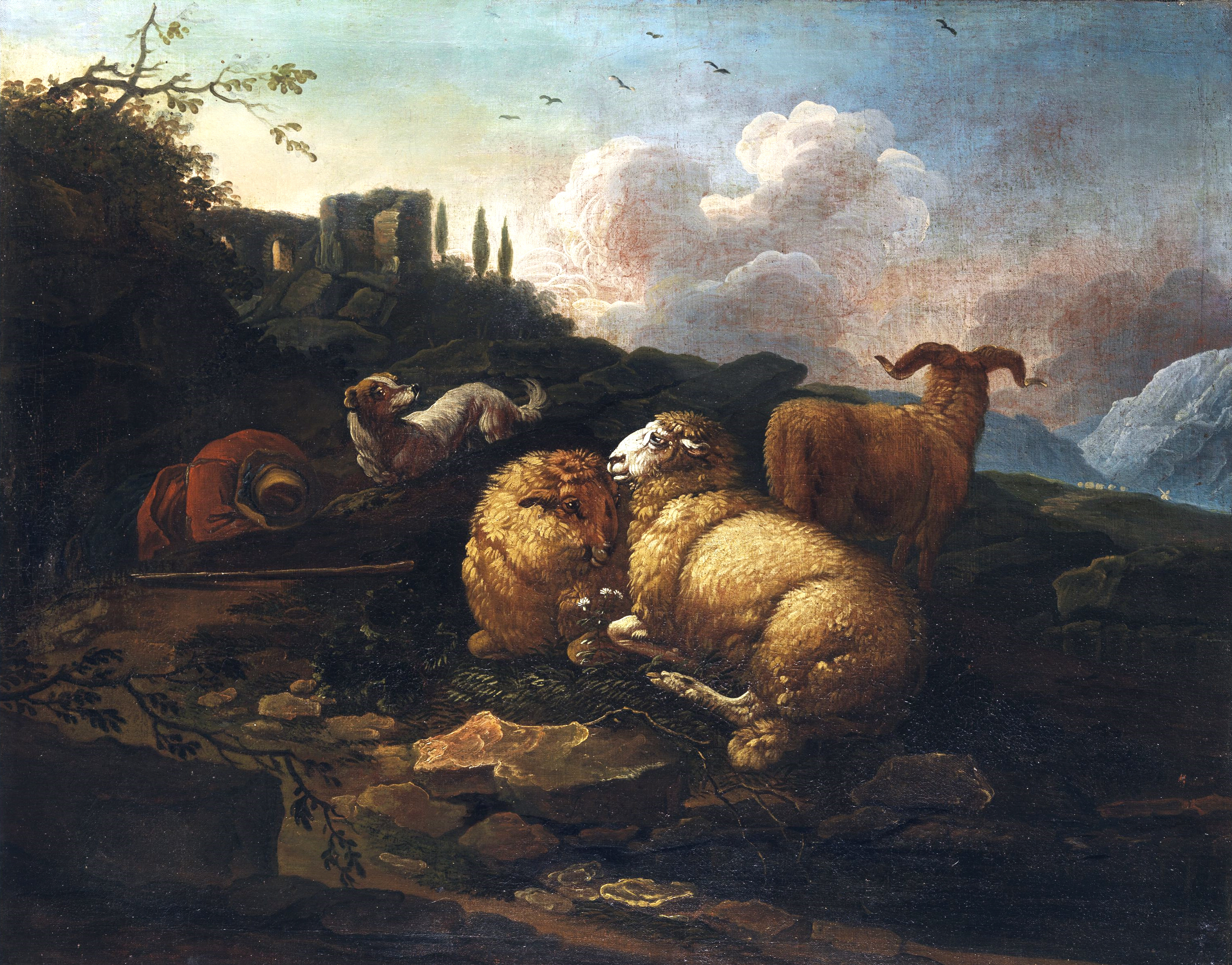 Schafherde mit schlafendem Hirten (lt. Auktionshaus Titel Et in Arcadia ego). Öl auf Leinwand. 89 x 112 cm. Unten auf Stein signiert „JM Roos".